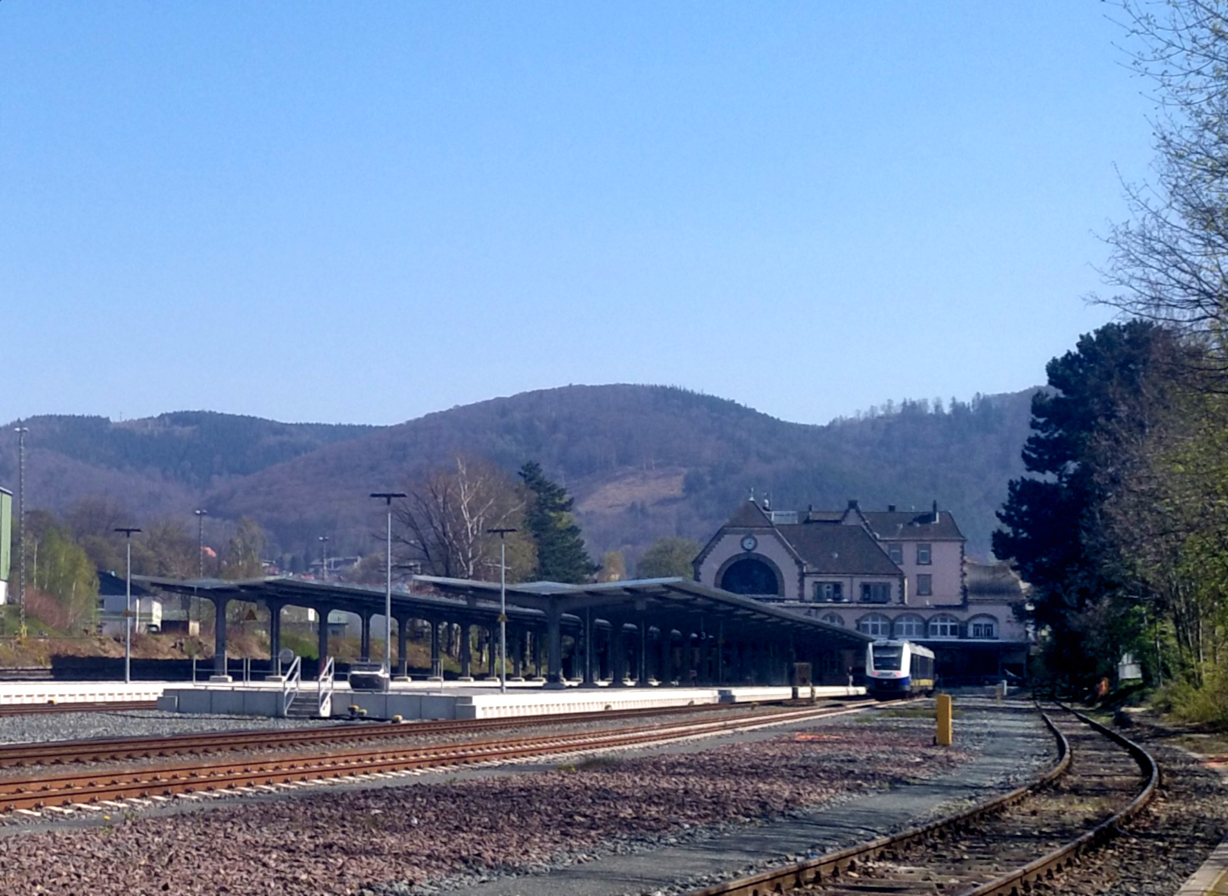 Blick auf den Bahnhof Bad Harzburg am 17. April 2019.